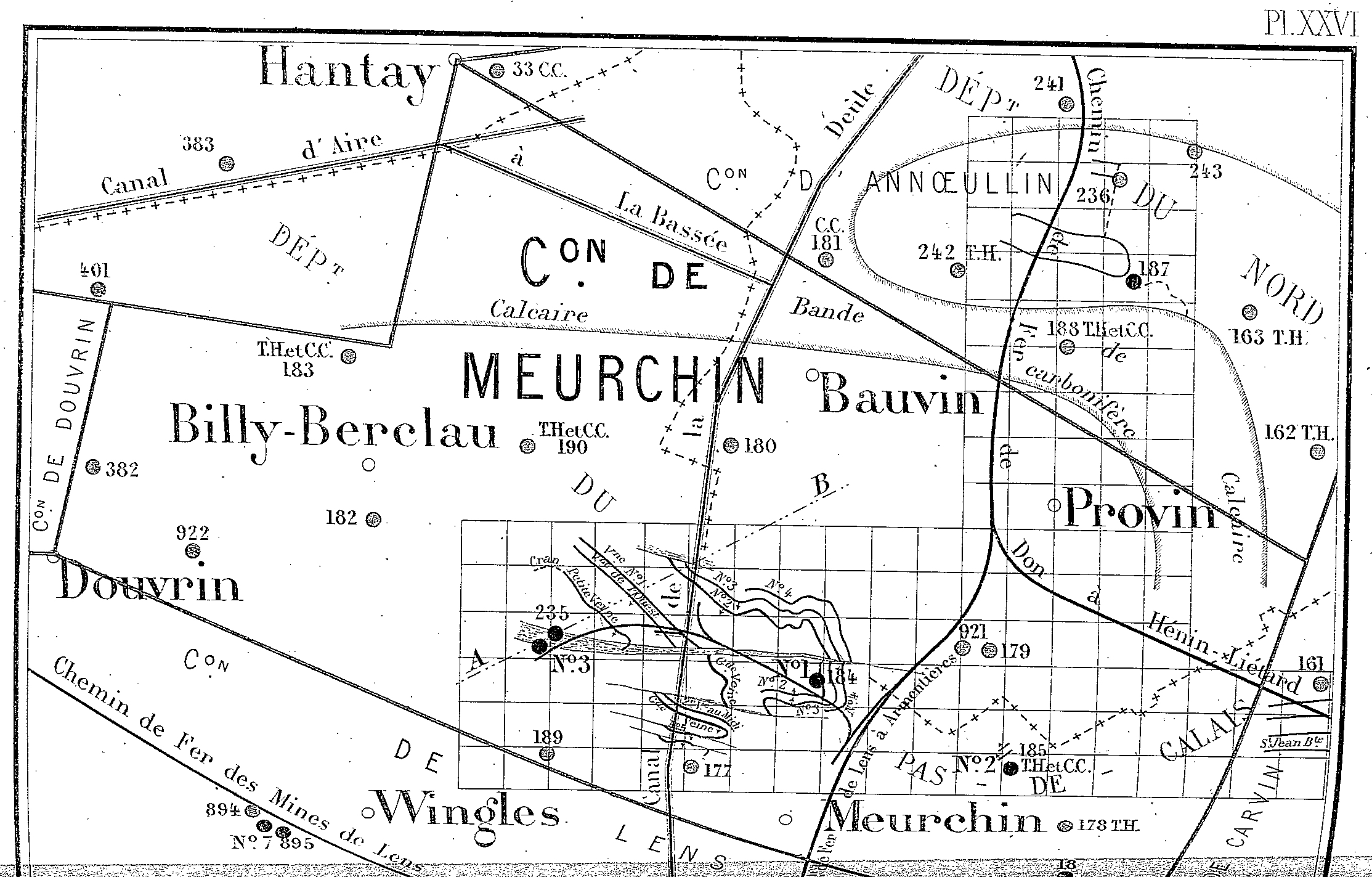 État des travaux de la Compagnie des mines de Meurchin en 1880.